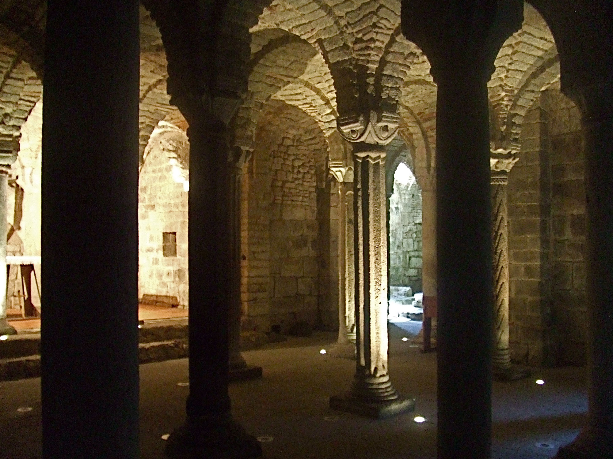 Crypte à colonnes de l'abbaye San Salvatore à Abbadia San Salvatore